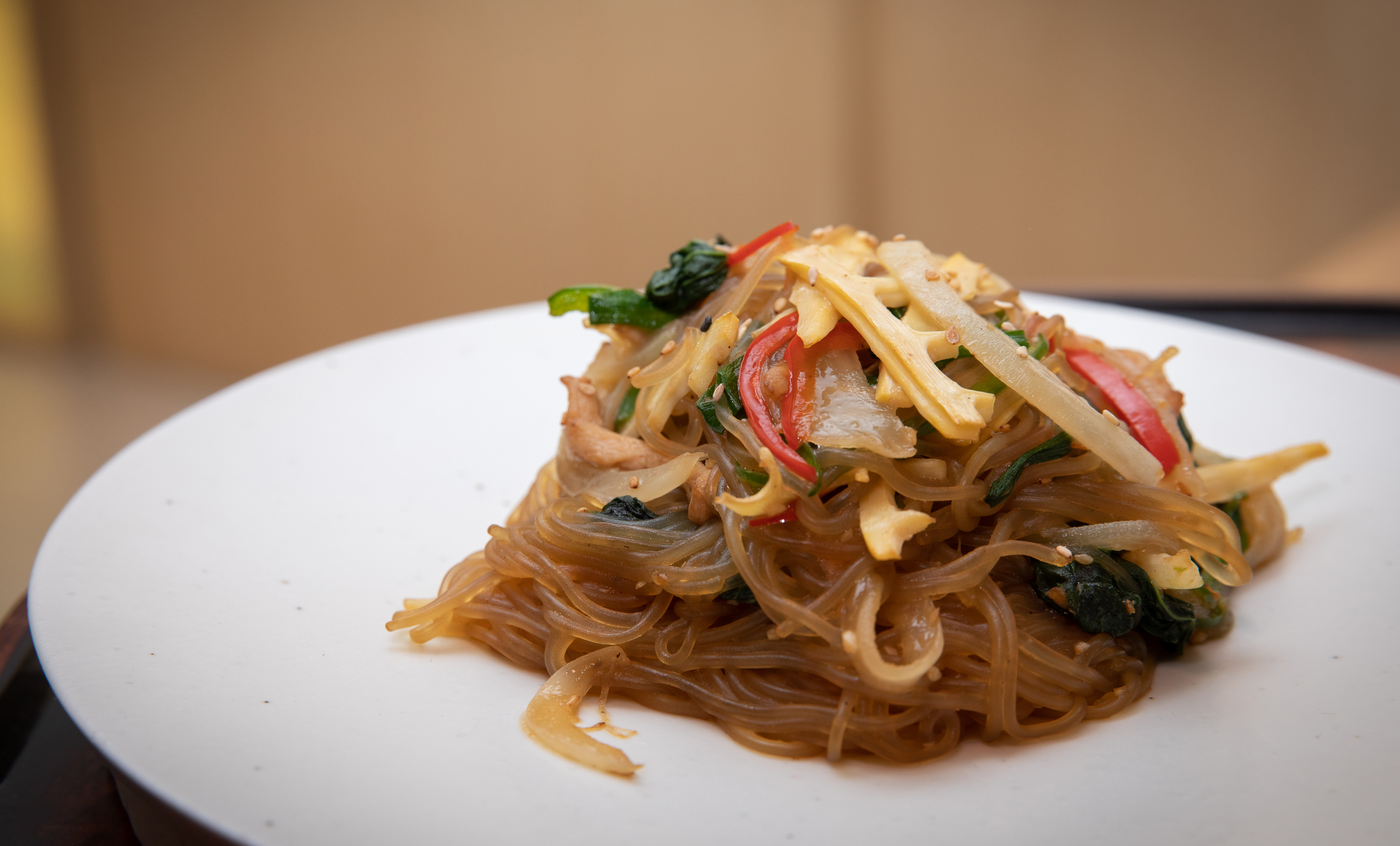 Polish & Korean Cuisine and Culture Exchanges Gradmother’s Recipes May 13, 2019 Korean Cuisine Culture Center, CKL Business Support Center, Cheonggyecheon, Seoul Ministry of Culture, Sports and Tourism Korean Culture and Information Service ( Official Photographer : Kim Sunjoo This official Republic of Korea photograph is being made available only for publication by news organizations and/or for personal printing by the subject(s) of the photograph. The photograph may not be manipulated in any way. Also, it may not be used in any type of commercial, advertisement, product or promotion that in any way suggests approval or endorsement from the government of the Republic of Korea. 한, 폴란드 수교 30주년 기념-2019 한폴란드 음식문화교류전 두나라 사람들의 전통 집밥 2019-05-13 한식진흥원 한식문화관 문화체육관광부 해외문화홍보원 코리아넷 김순주